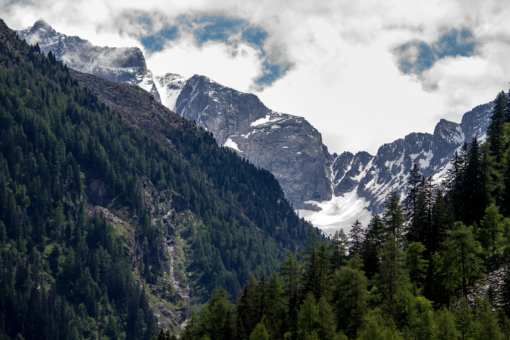 Blick ins obere Seebachtal